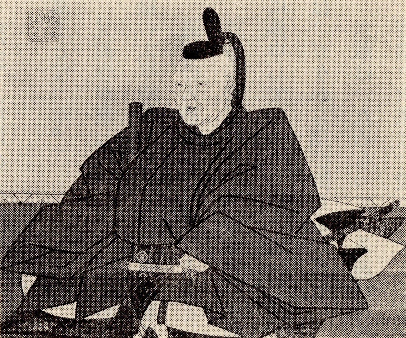 久留島通清の肖像(モノクロ)。